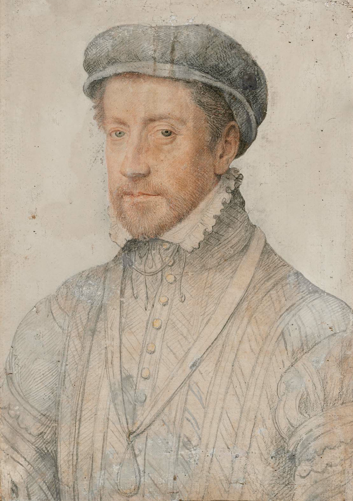 Portrait of Louis de Bourbon, duc de Montpensier.